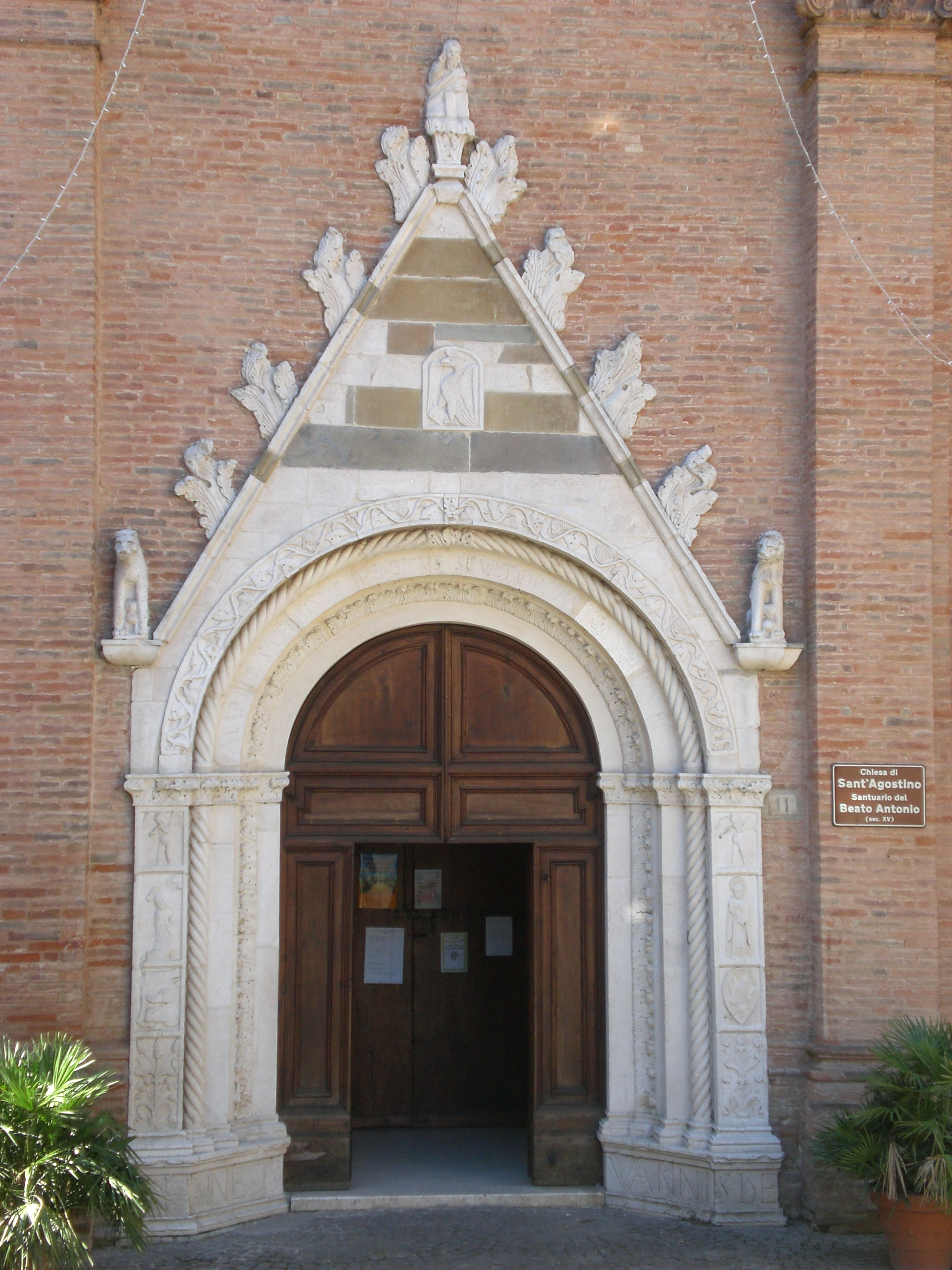 Chiesa di Sant'Agostino, portale di marino di Marco Cedrino, XV secolo